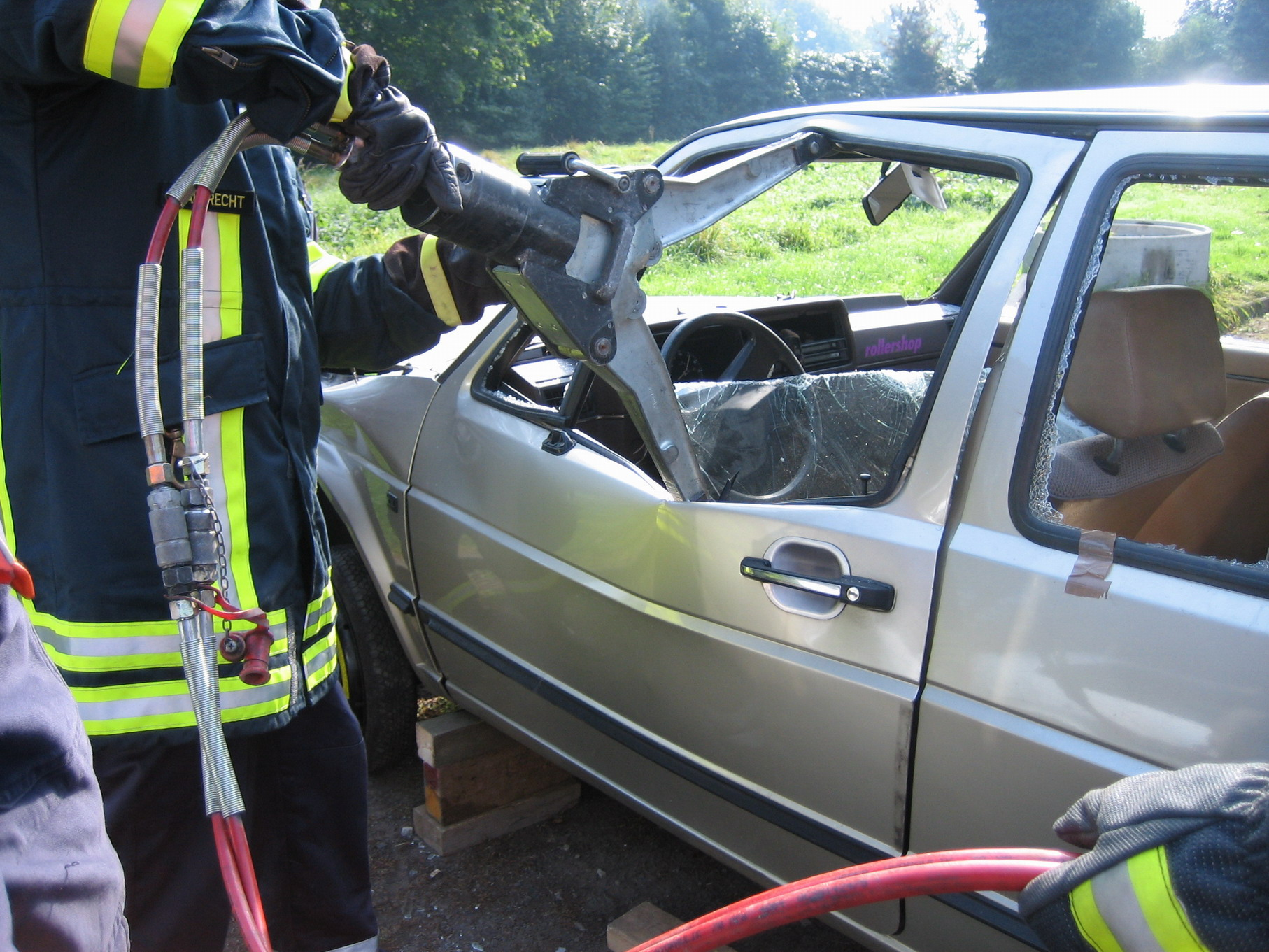 Einsatz des Spreizers, Schaffen einer Arbeitsöffnung am Türschloss (Goettingen, Germany )